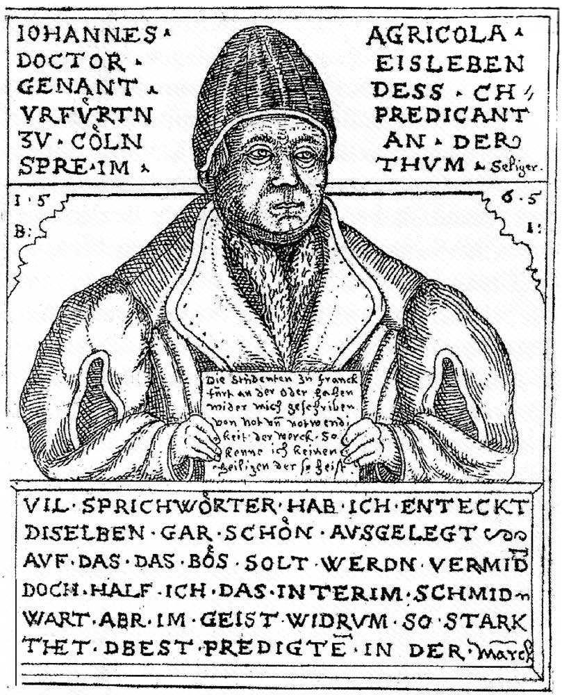 Holzschnitt von Johannes Agricola aus Eisleben 16. Jahrhundert von Seliger